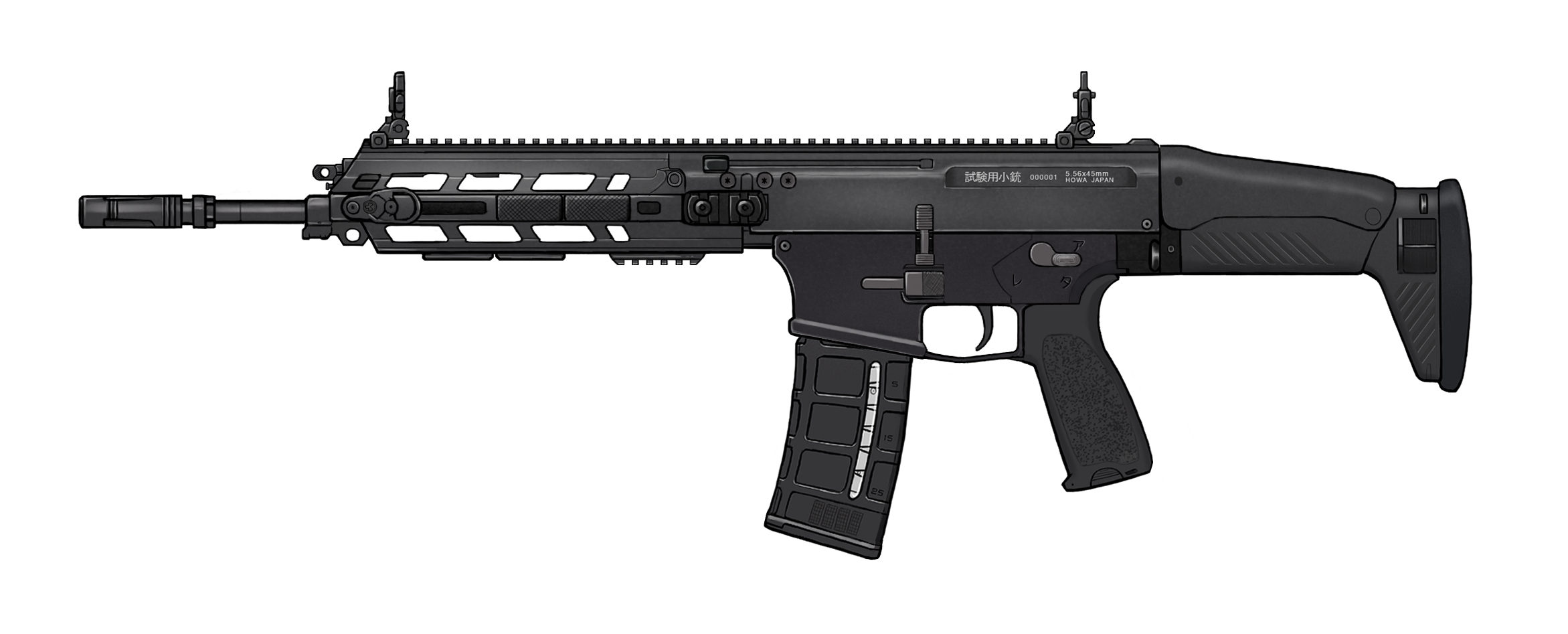 20式5.56mm小銃のプロトタイプ。レシーバーの刻印が「試験用小銃」となっている。